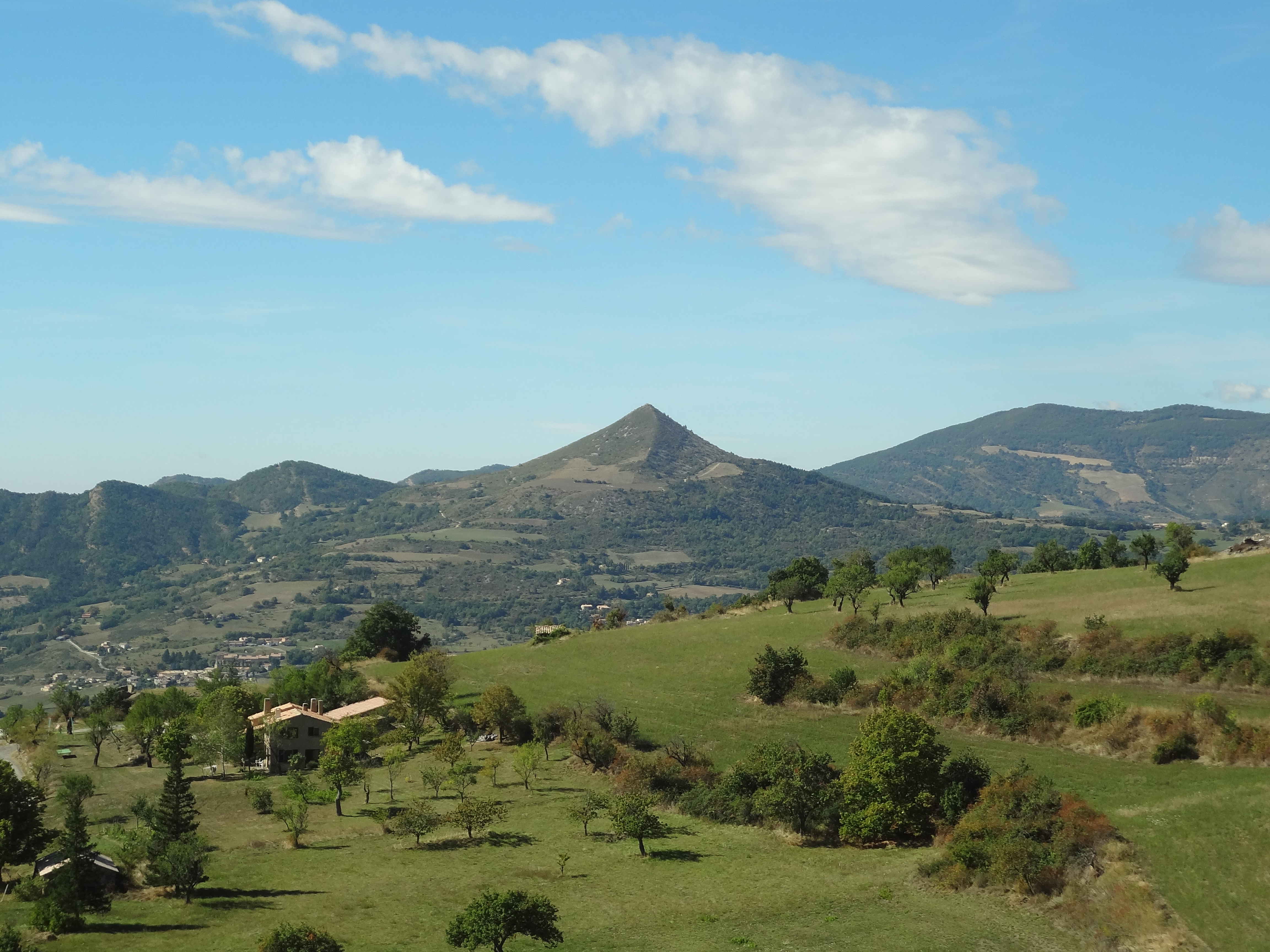 Pic d'Oise, à Champtercier (vu de Courbons). 1140 m d’altitude.